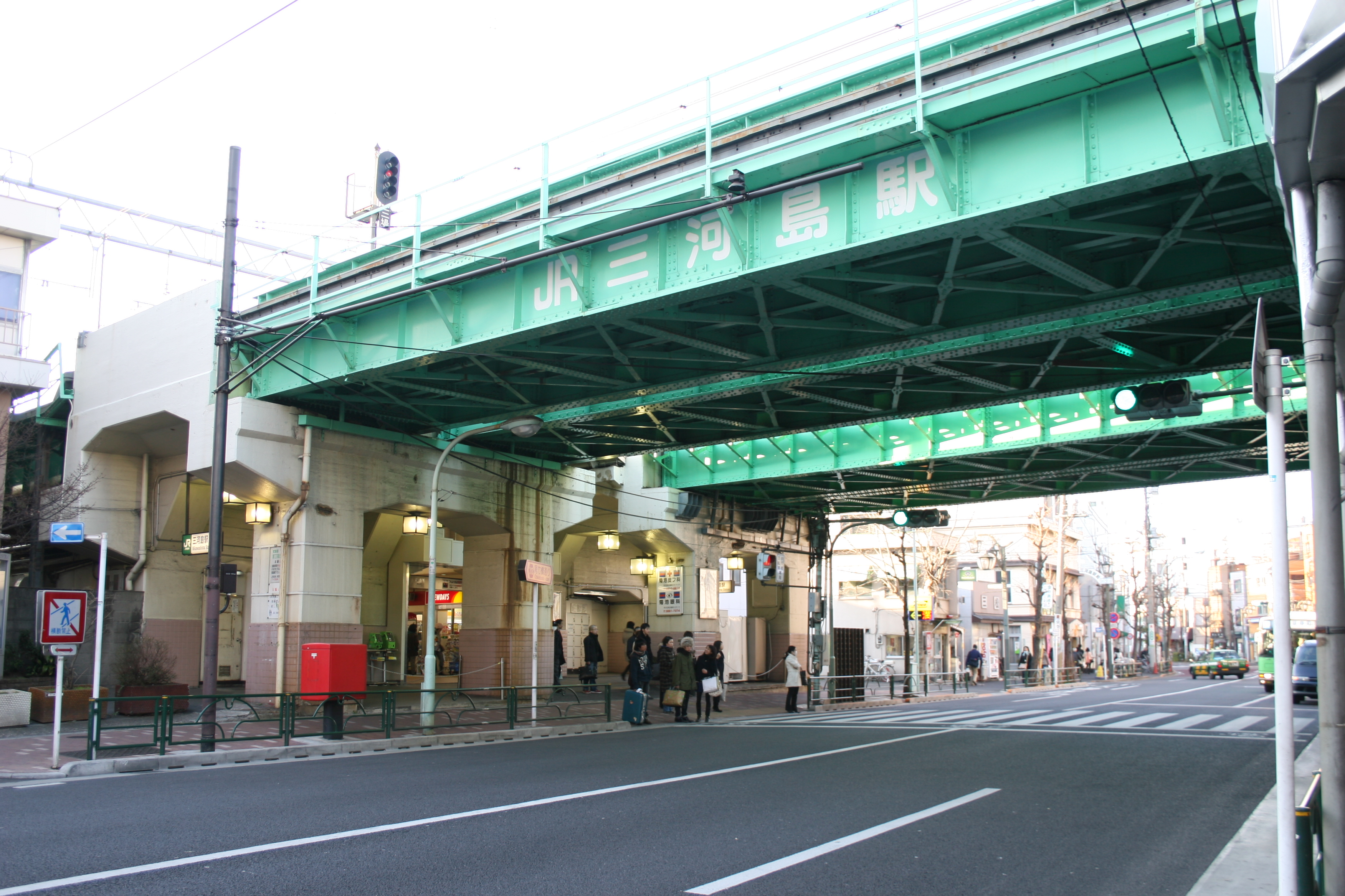 Mikawashima Station, a railway station in Arakawa, Tokyo, Japan